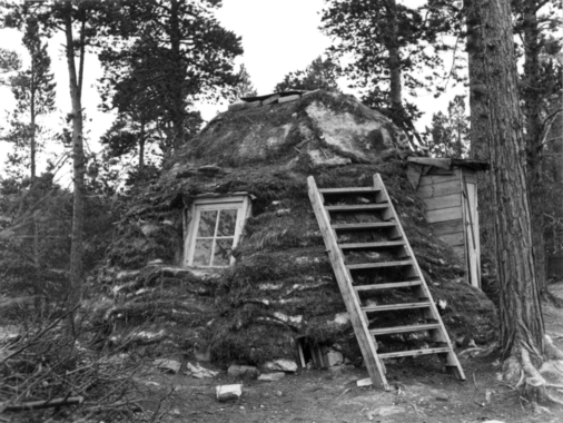 Oluf Blinds gamme med vindu og utvendig stige, gammen lå i nærheten av hotellet på Saltfjell. Saltfjell, Saltdalen, Nordland 1956.